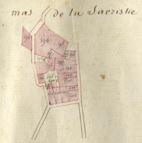 La Sagristia dels Masos en el Cadastre napoleònic del 1812 (Arxius Departamentals dels Pirineus Orientals)